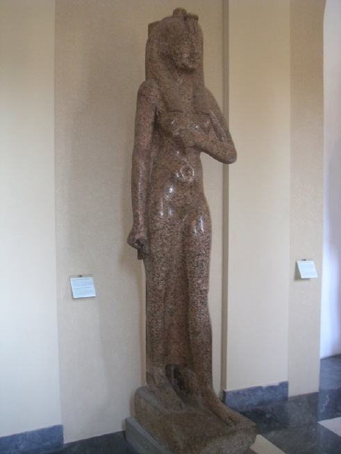 Statue colossale de la reine Arsinoé II provenant d'Héliopolis - Museo Gregoriano du Vatican - Rome